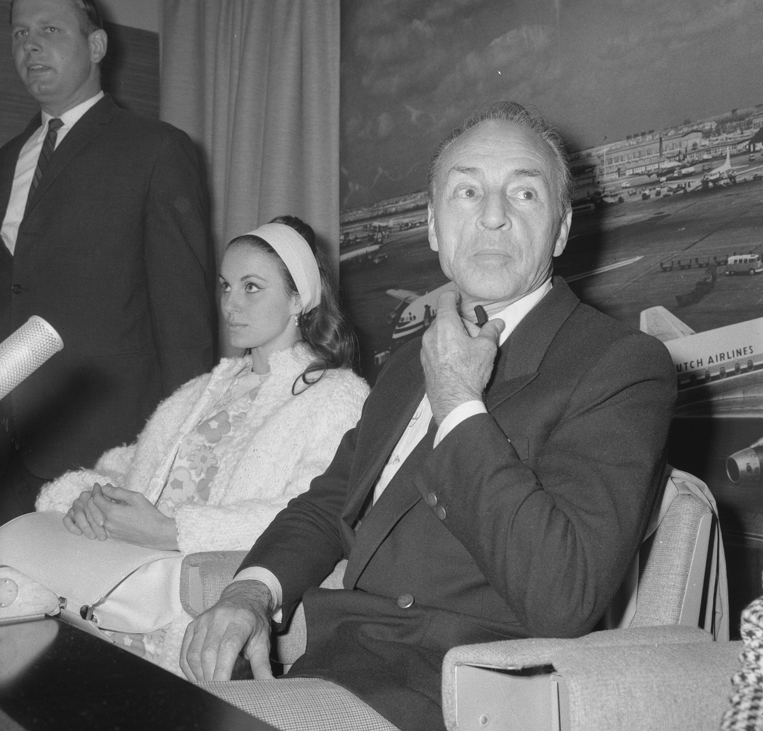 Collectie / Archief : Fotocollectie Anefo Reportage / Serie : [ onbekend ] Beschrijving : George Balanchine op Schiphol Datum : 24 augustus 1965 Locatie : Noord-Holland, Schiphol Trefwoorden : aankomsten Persoonsnaam : George Balanchine Fotograaf : Nijs, Jac. de / Anefo Auteursrechthebbende : Nationaal Archief Materiaalsoort : Negatief (zwart/wit) Nummer archiefinventaris : bekijk toegang 2.24.01.03 Bestanddeelnummer : 918-1047